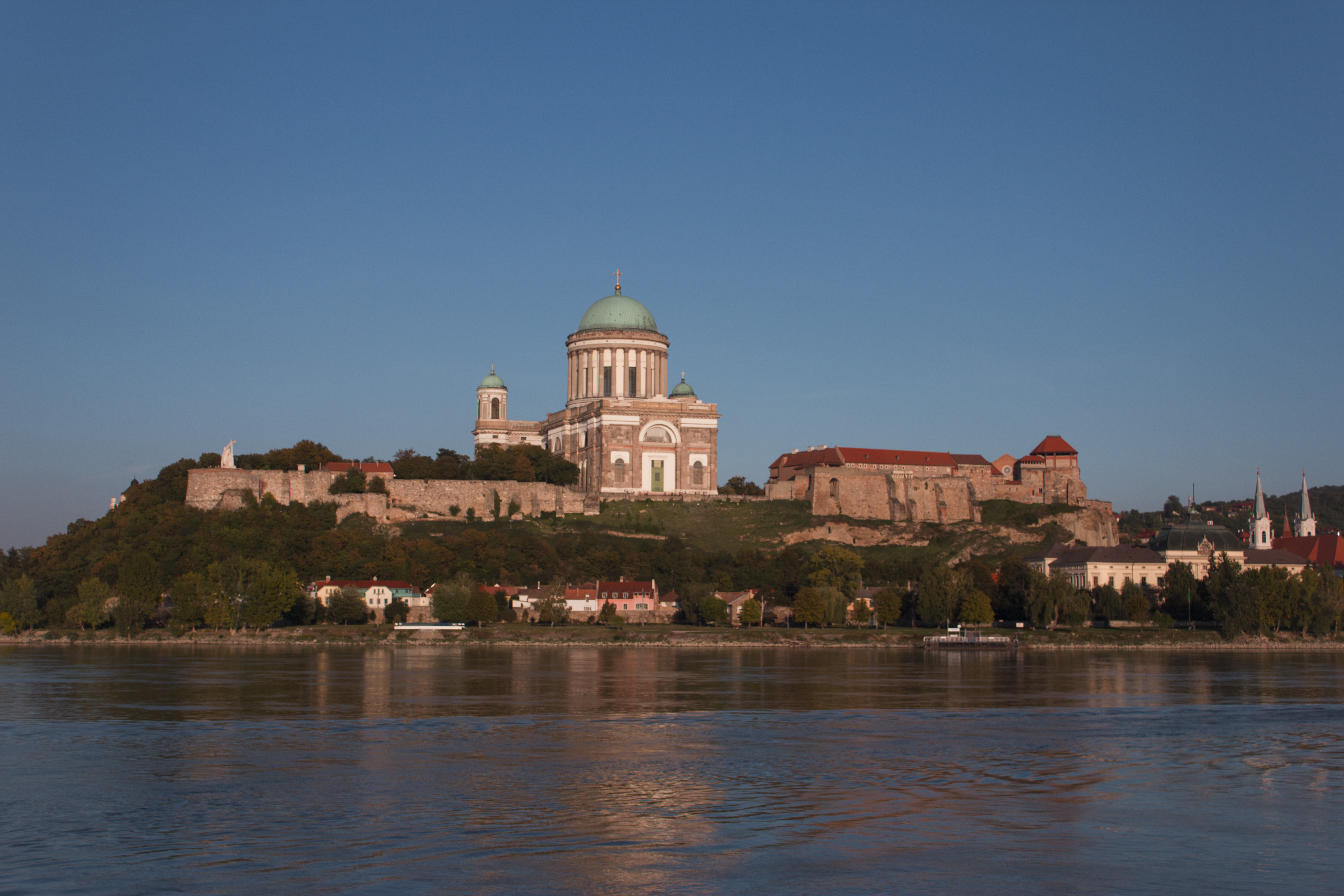 vár, a királyi, majd érseki palota maradványainak együttese This is a photo of a monument in Hungary. Identifier: 91100